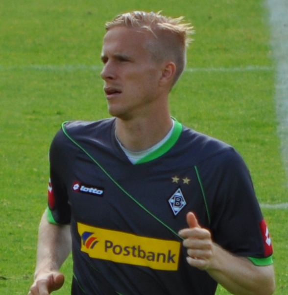 Wendt beim Spiel gegen Aberdeen